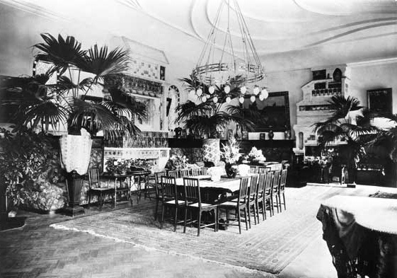 Pokrovskoye Estate. The drawing room.